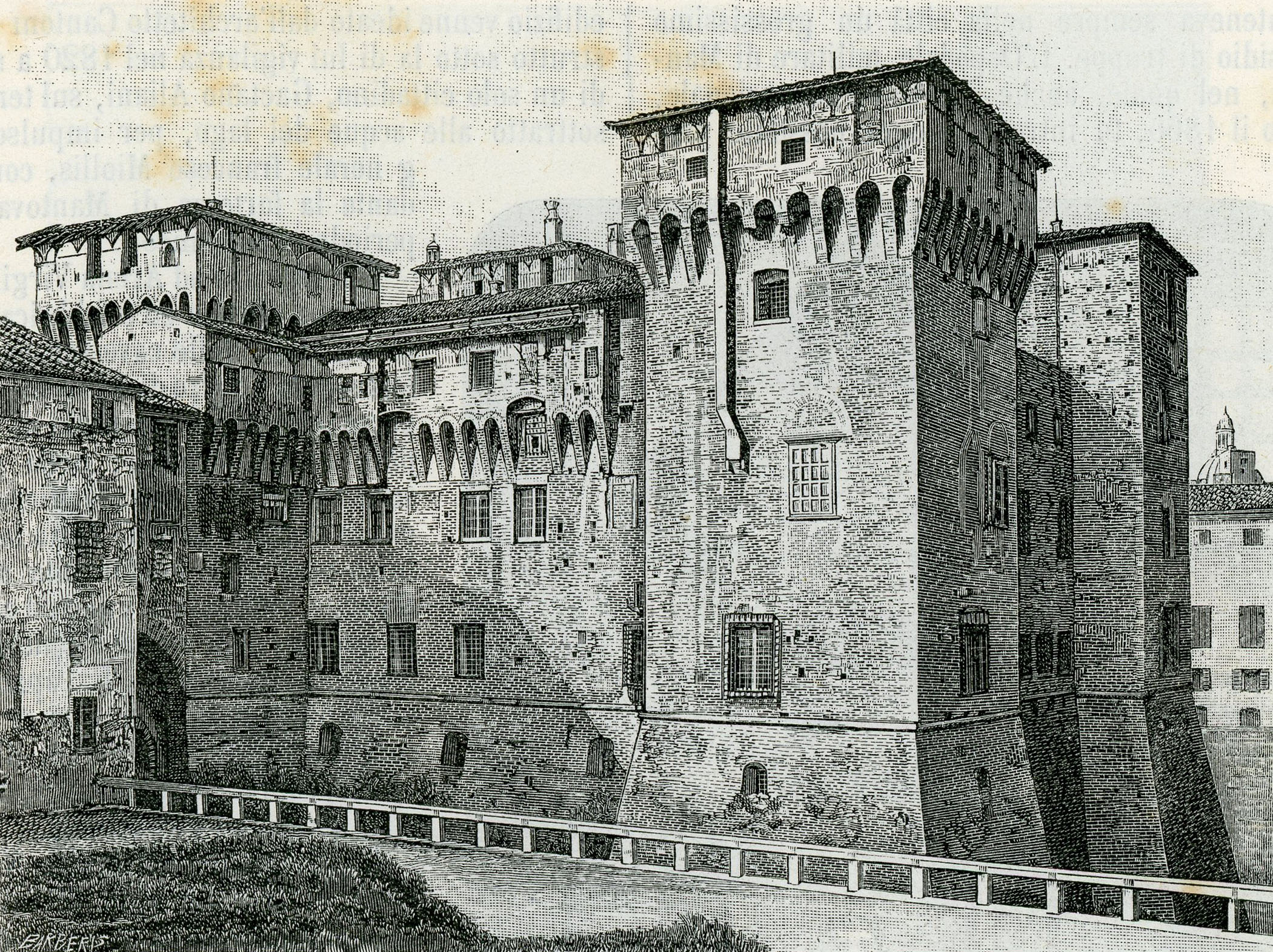 Mantova: Castello di Corte o di San Giorgio (xilografia di Giuseppe Barberis).